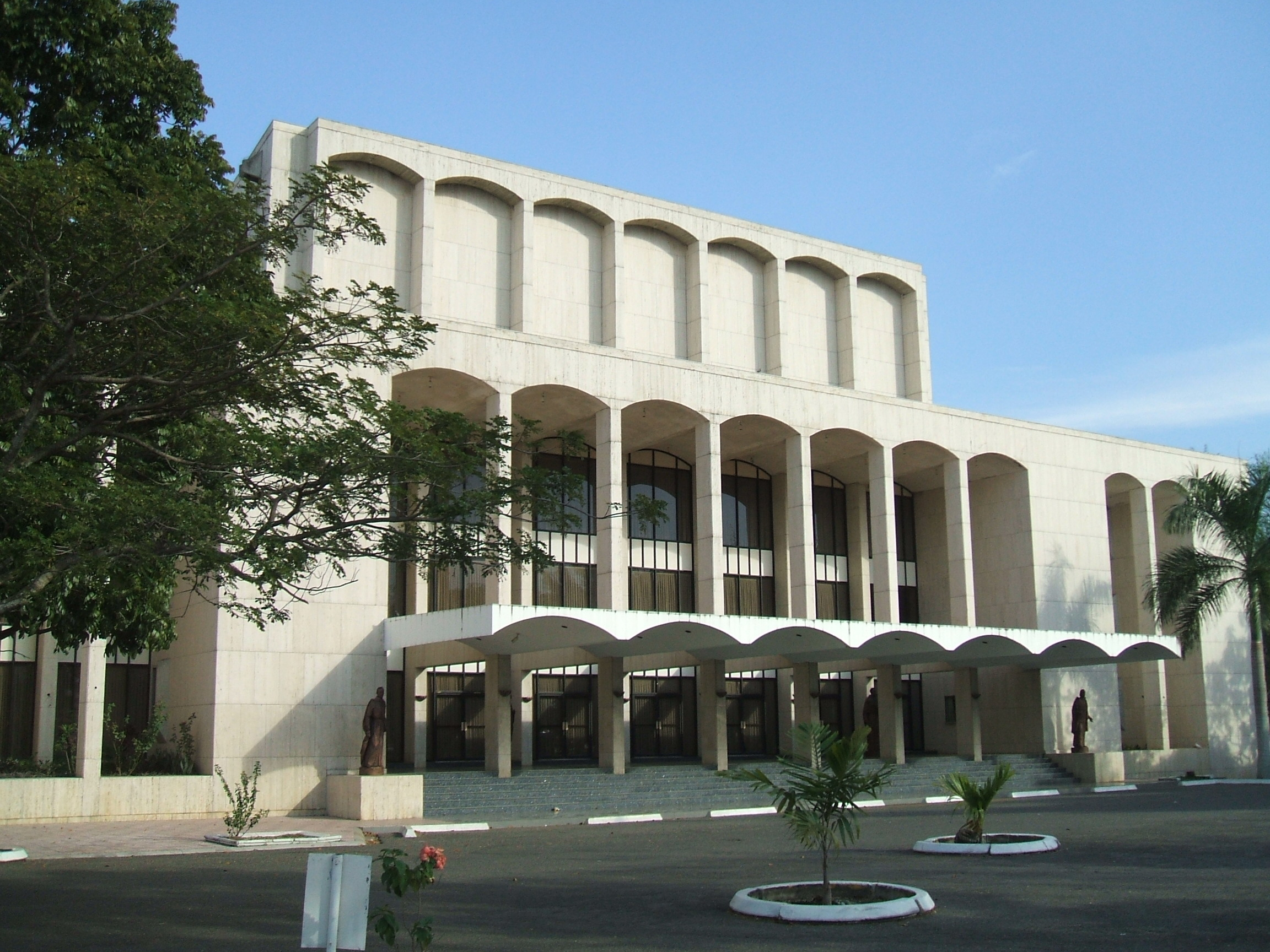 Gran Teatro del Cibao en Santiago de los Treinta Caballeros, República Dominicana.